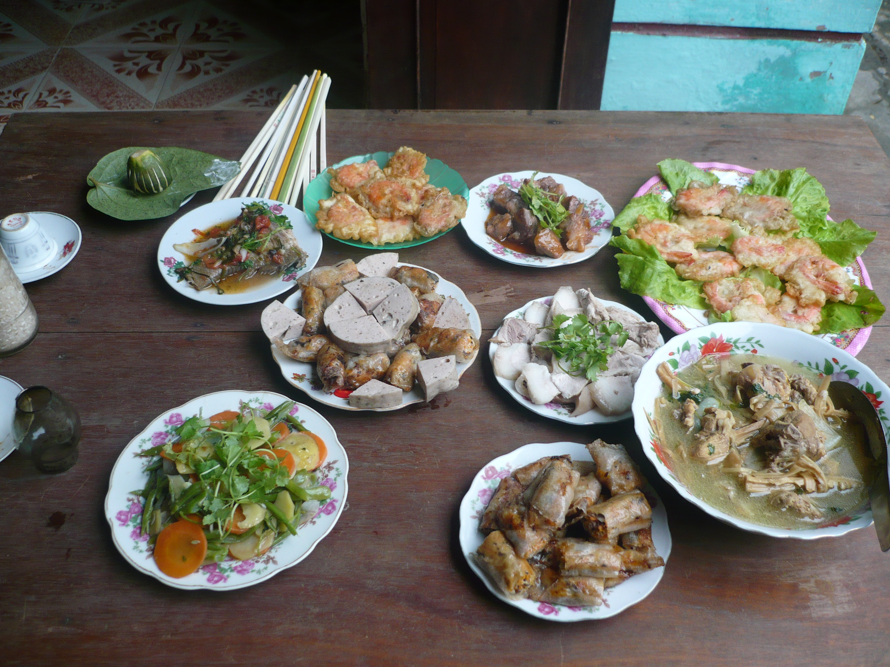 Đồ ăn